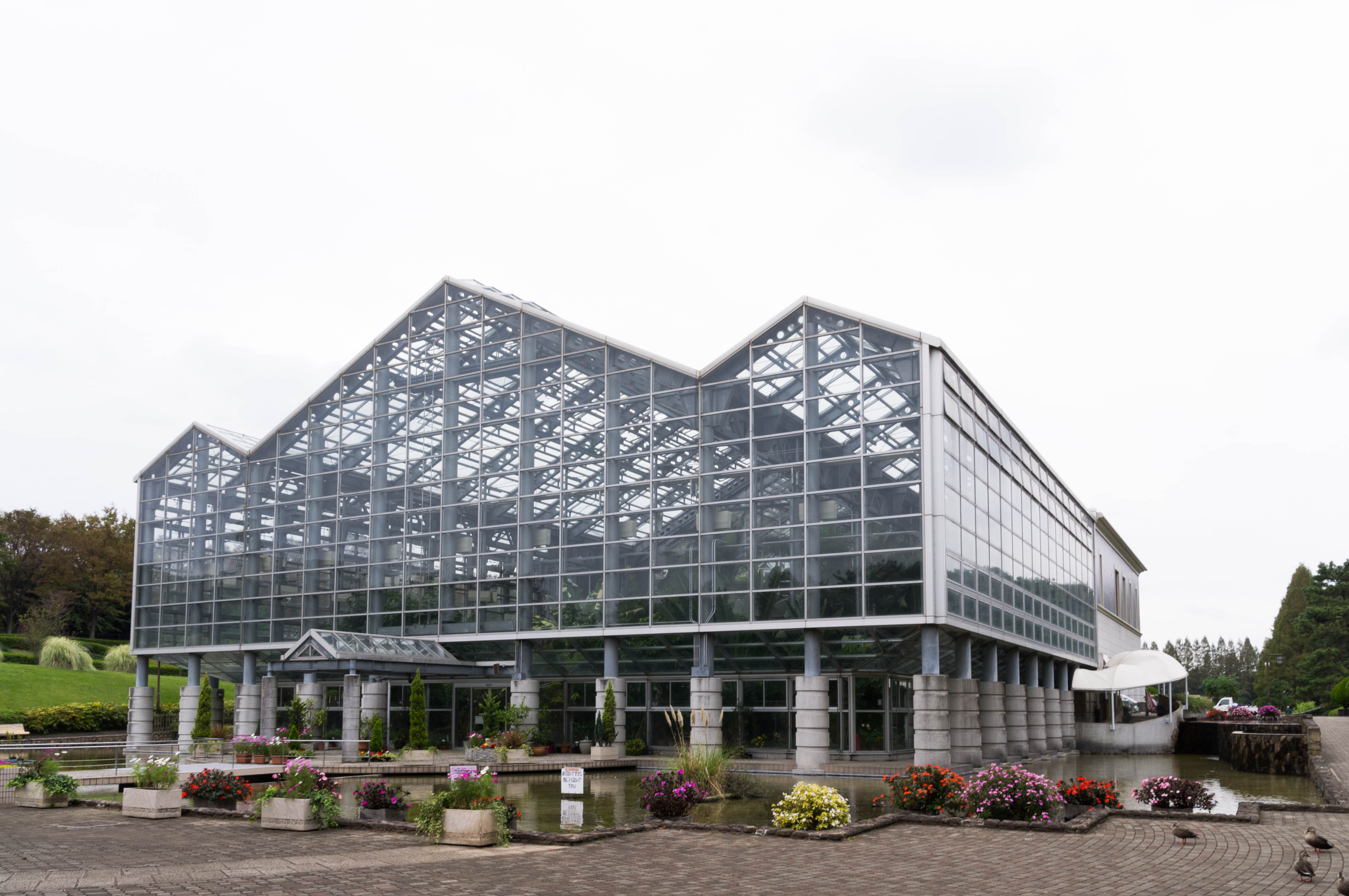 神奈川県立相模原公園内の施設、グリーンハウス